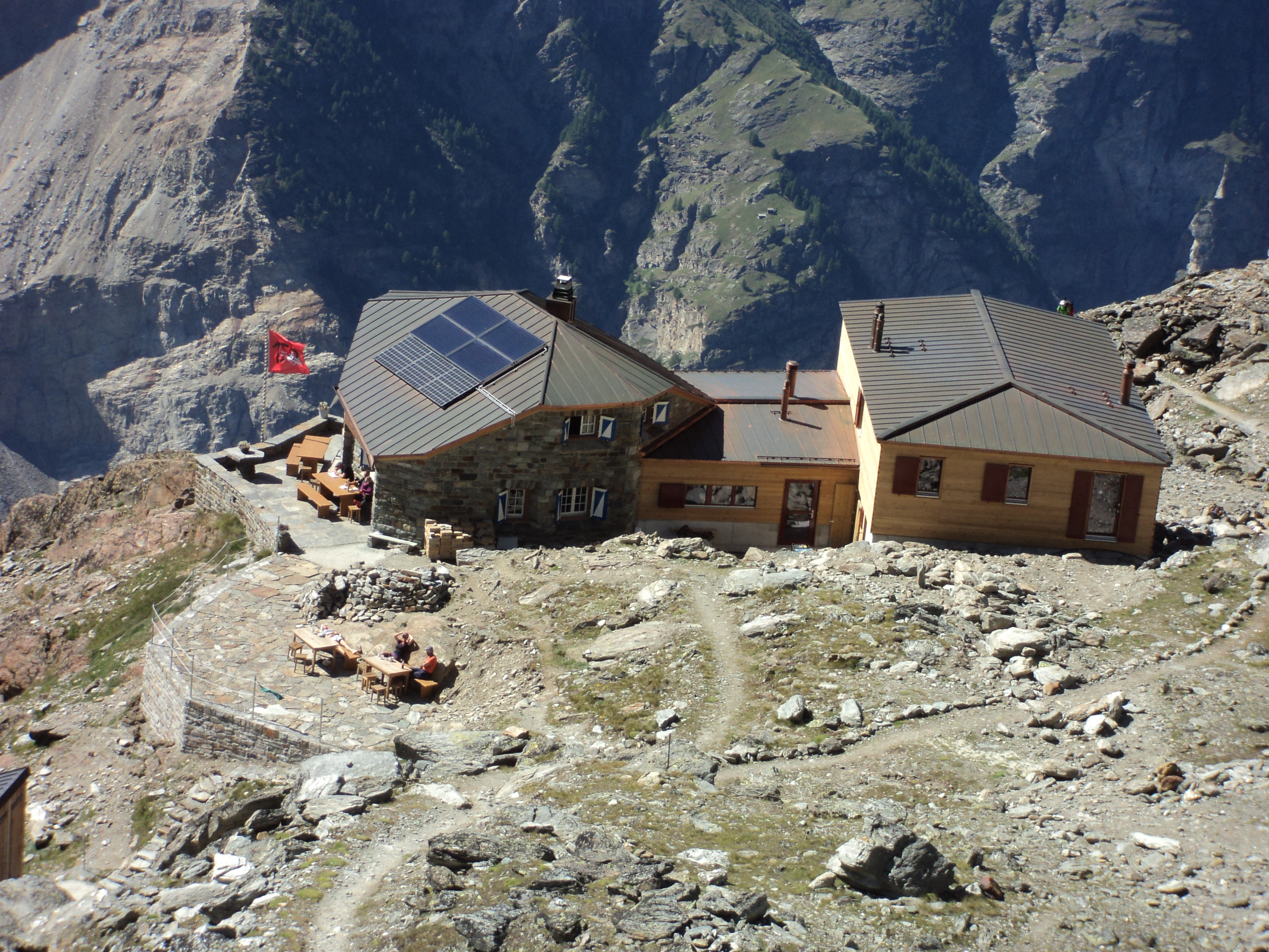 La Domhütte nel 2013 dopo l'ampliamento e la ristrutturazione del 2012.